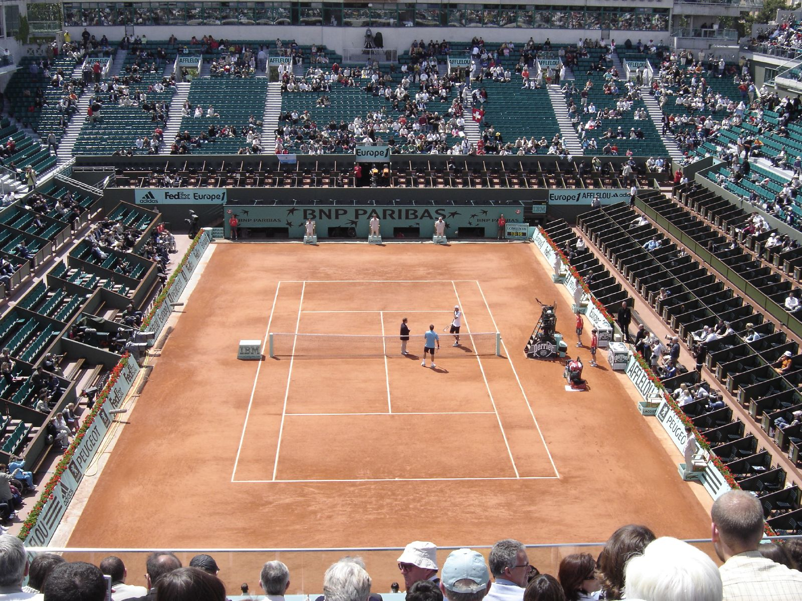 Internationaux de Roland Garros Paris 01/06/2007 court central Philippe Chatrier